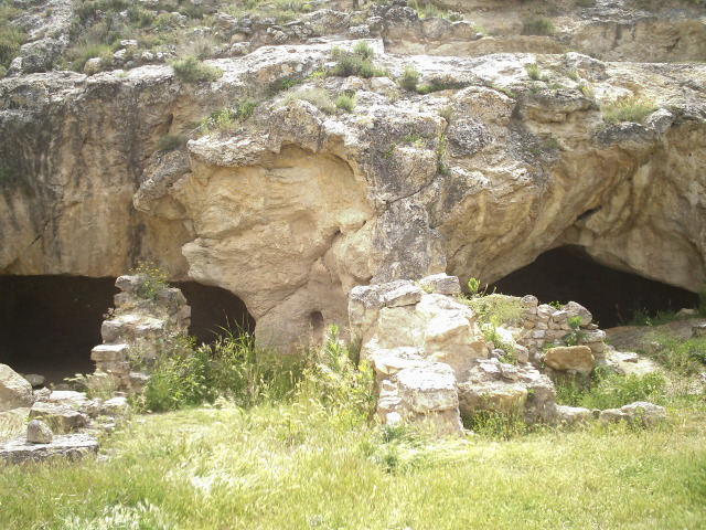 Contrebia Leukade Restos casas 2.